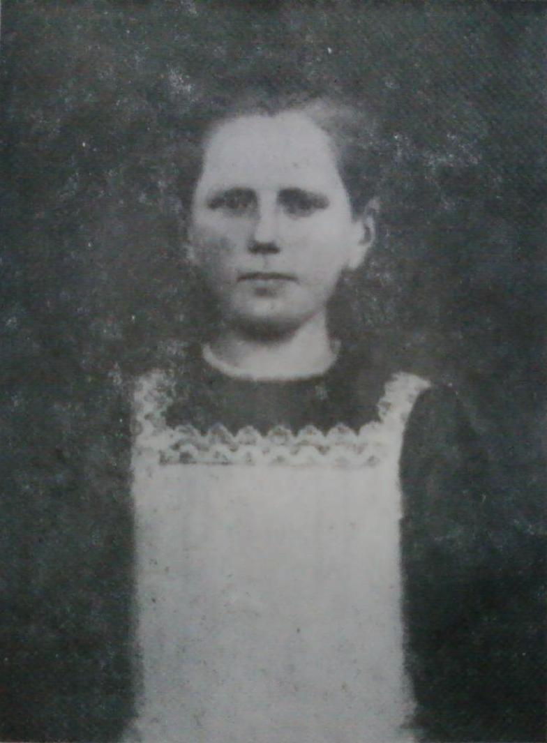 Zdjęcie Karoliny Kózki